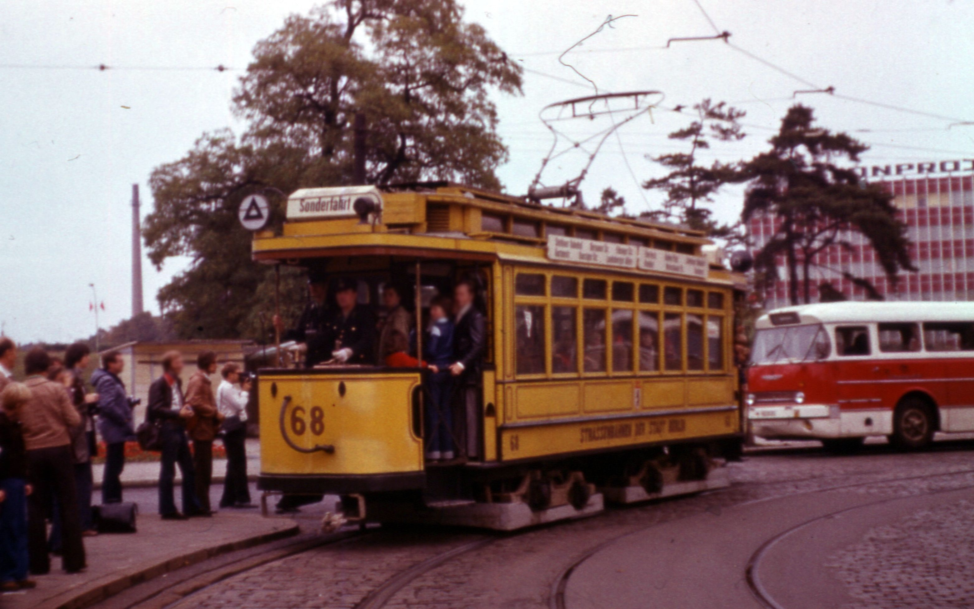 Eisenbahnsonderfahrt Dresden-Dessau 1979